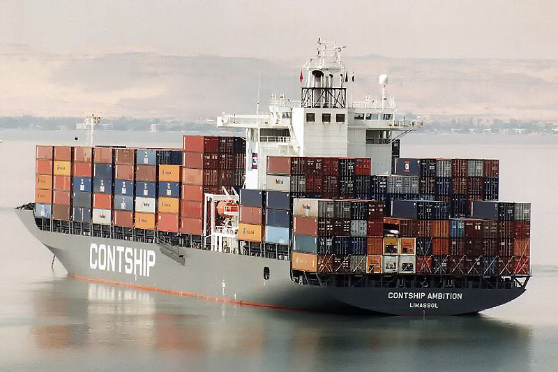 CONTSHIP AMBITION im Great Bitter Lake